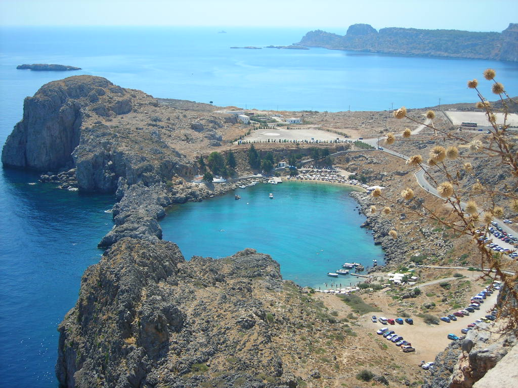 Rodi - Spiaggia sconosciuta